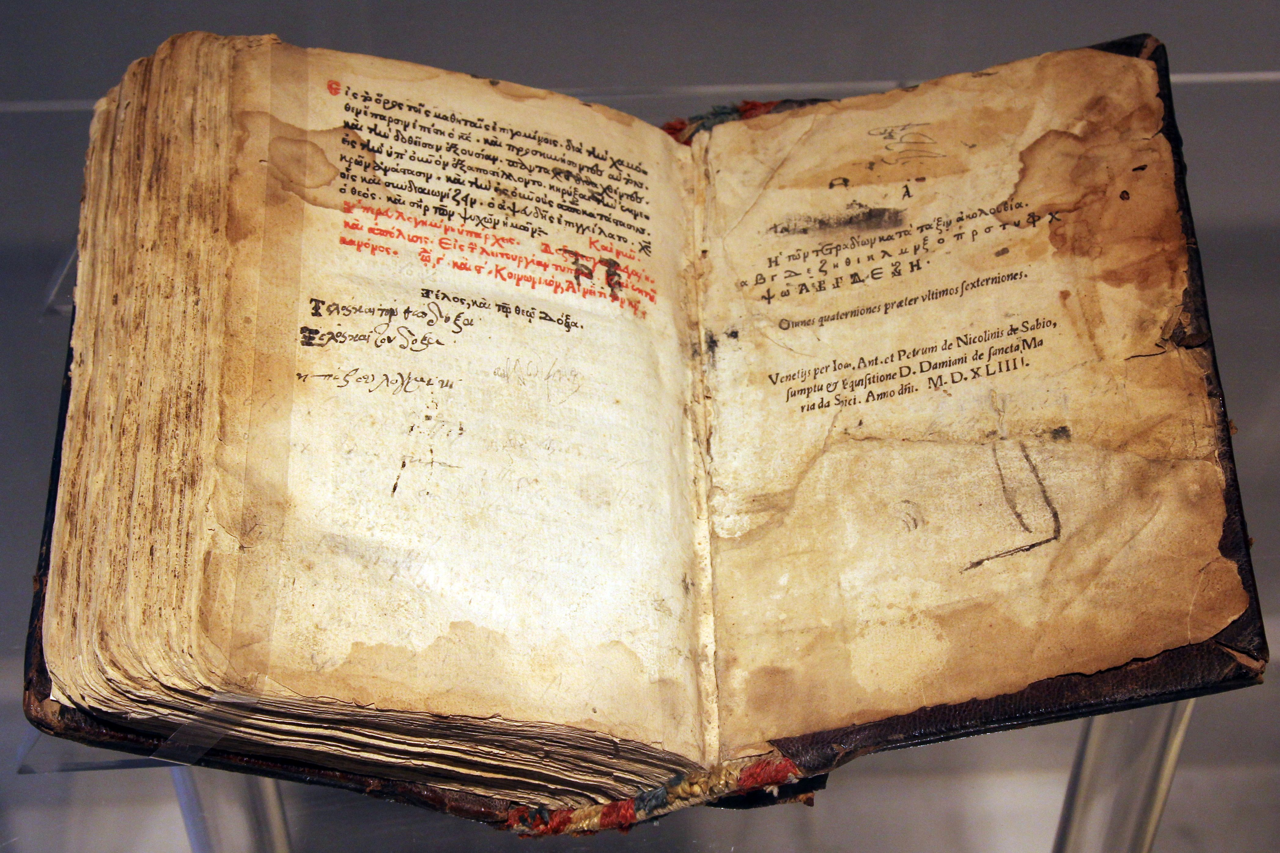 Byzantine-style binding of the liturgical imprint, bound in a monastic bindery of the East. Library of the Onassis Foundation 781. 'The Art of Bookbinding: From Byzantium to Contemporary Artistic Creation' (Sept. 2012 - Feb. 2013). Temporary exhibition. Byzantine and Christian Museum, Athens, Greece. --- Πεντηκοστάριον. Βενετία. Σάβιοι (di Nocilini da Sabbio). 1544. Έντυπο λειτουργικό βιβλίο με στάχωση βυζαντινού τύπου, που έχει δεθεί σε μοναστηριακό βιβλιοδετείο της Ανατολής. "Η Τέχνη της Βιβλιοδεσίας. Από το Βυζάντιο στη Σύγχρονη Εικαστική Δημιουργία" Σεπ 2012 - Φεβ. 2013. Περιοδική έκθεση. Βυζαντινό και Χριστιανικό Μουσείο, Αθήνα.